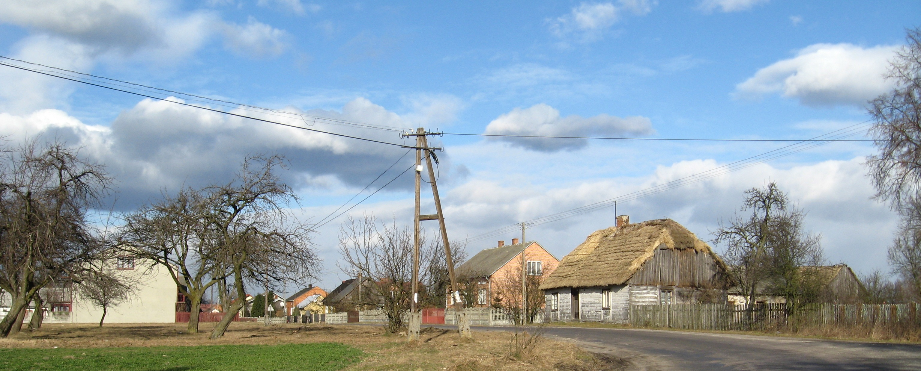 Bukowiec nad Pilicą, Poland - Google Maps - Google Earth